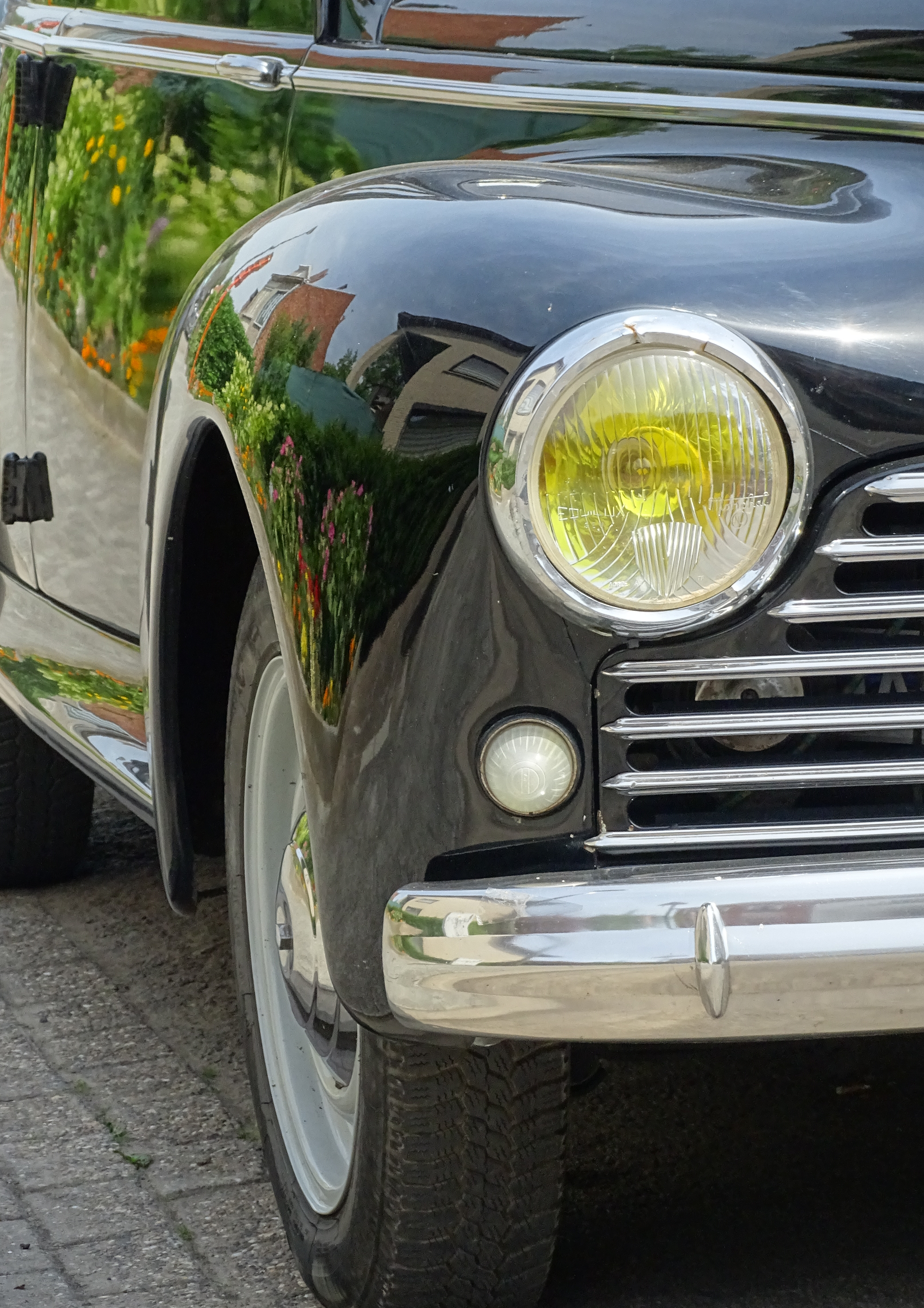 Een Peugeot 203 in Mechelen.